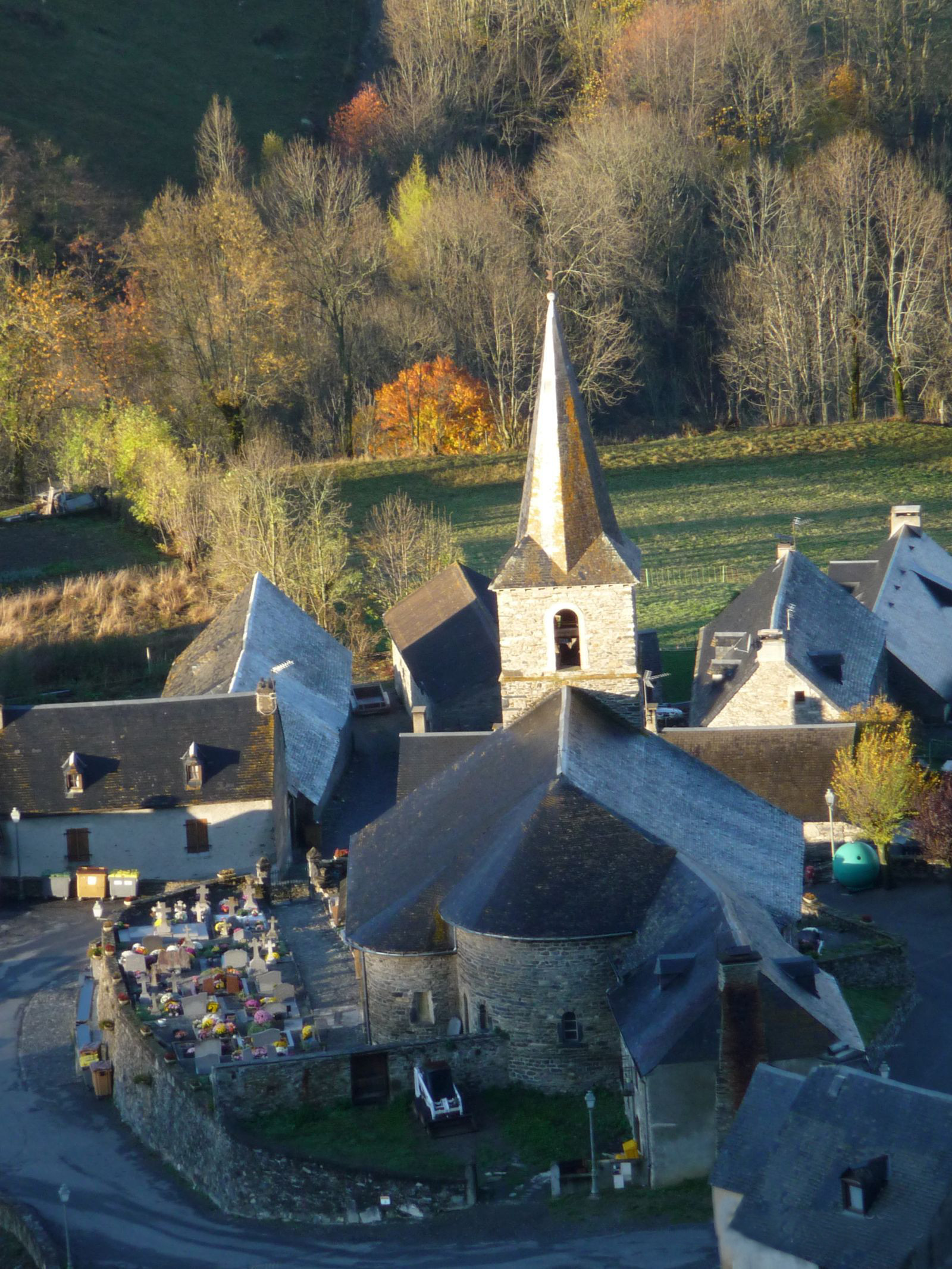 Azet (Hautes-Pyrénées, France), église Notre-Dame de l'Assomption.